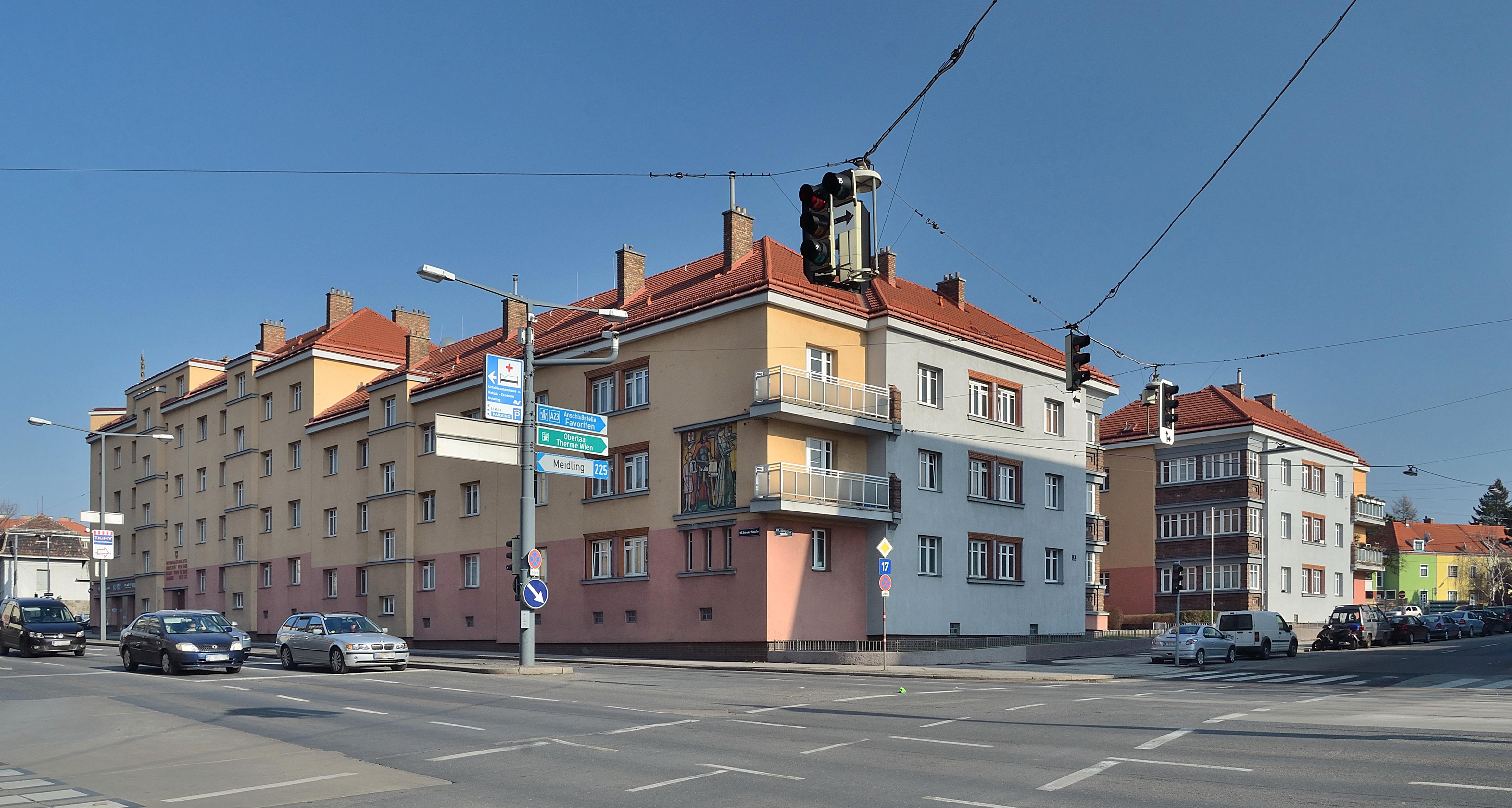 Wohnhausanlage der Gemeinde Wien Altdorferstraße 2, Favoriten